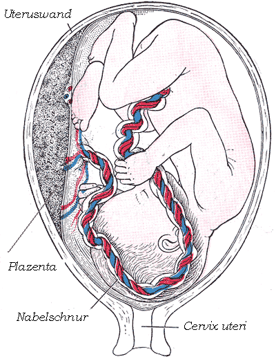 Changes by Benutzer:Sjoehest